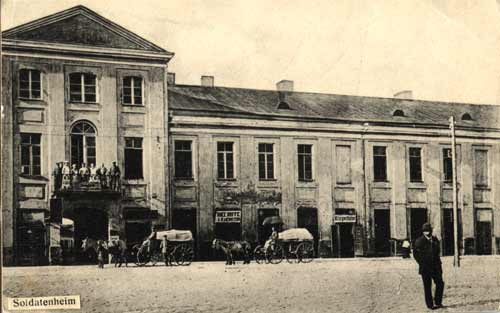 Беларуская (тарашкевіца): Горадня (Horadnia), пляц Стары Рынак (plac Stary Rynak). Палац Радзівілаў (Radzivił)